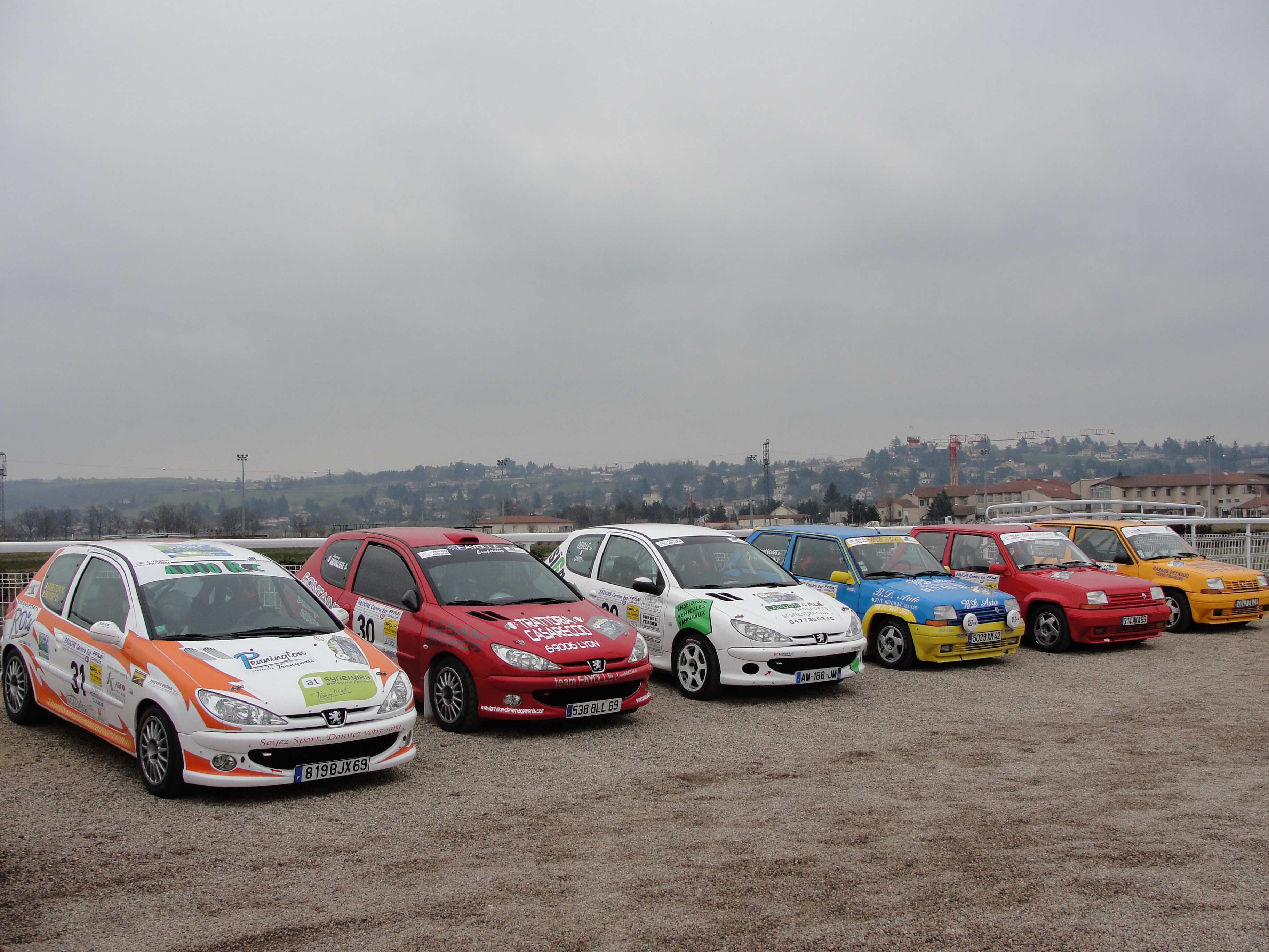 28e rallye baldomérien, parc fermé de l'hippodrome de St-Galmier (Loire), 7 mars 2010.